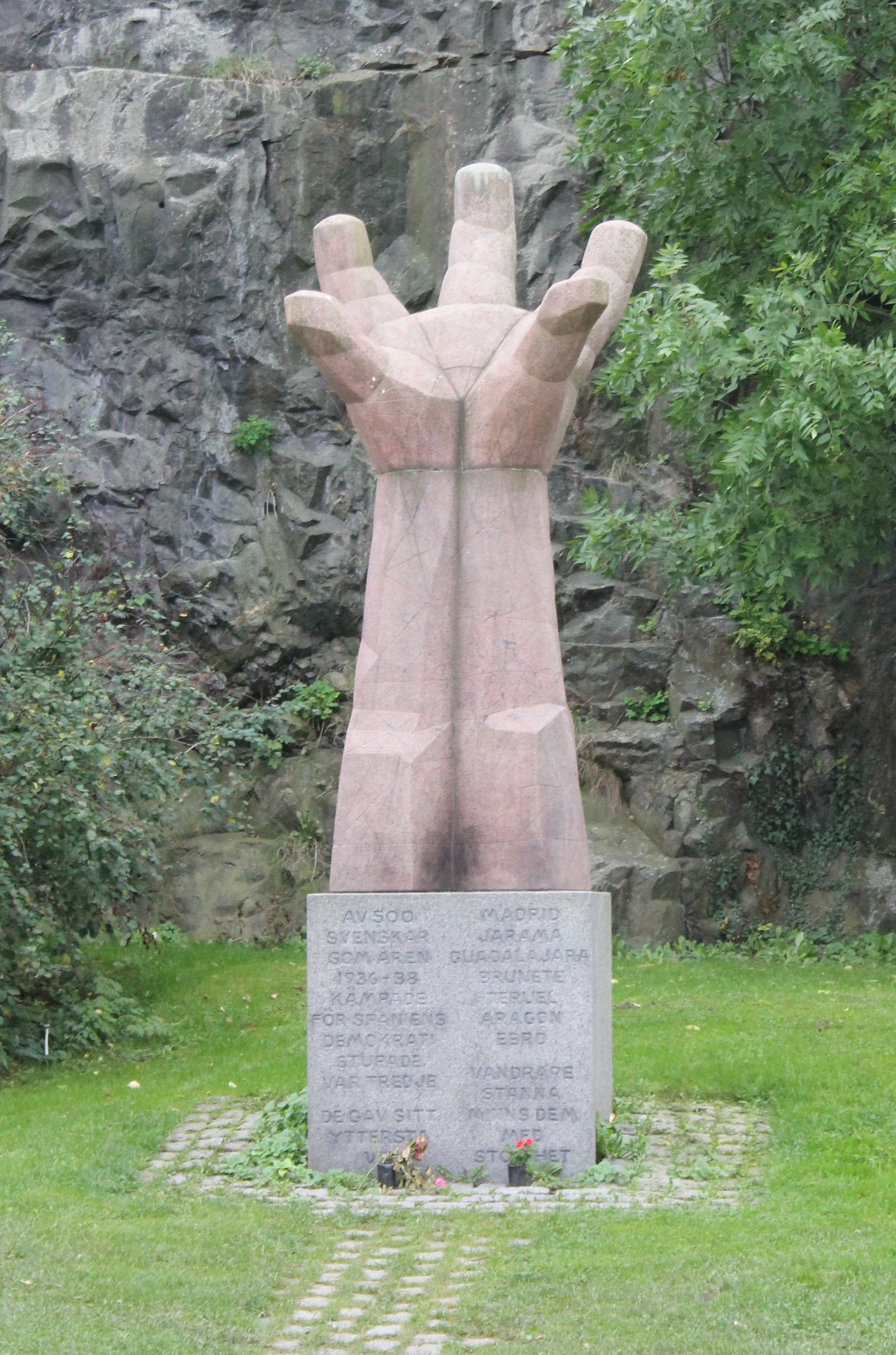 Skulpturen La mano på Katarinavägen på Södermalm i Stockholm är ett monument över de svenskar som stupade i Spanska inbördeskriget.